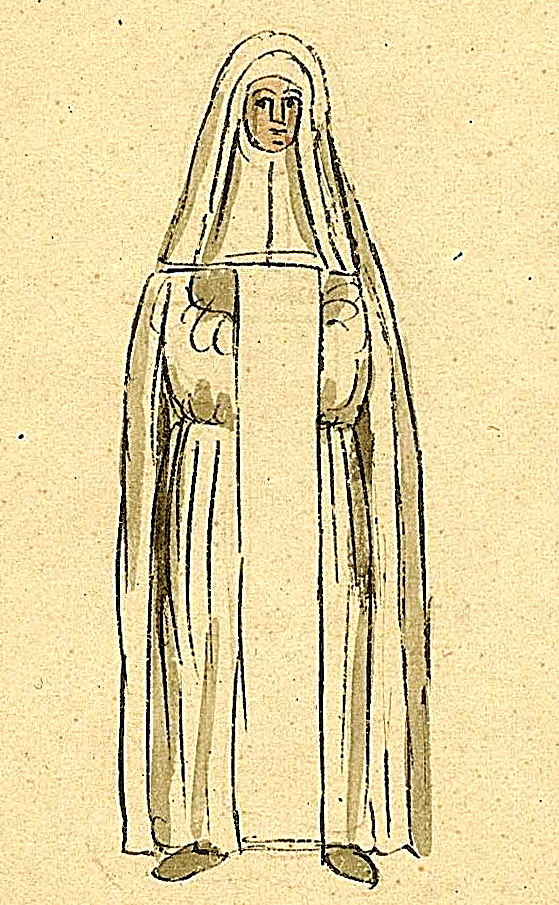 Tekening van Philippe van Gulpen van een zuster van het Wittevrouwenklooster in Maastricht. Collectie Van der Noordaa in het RHCL, Maastricht, CVDN 336.